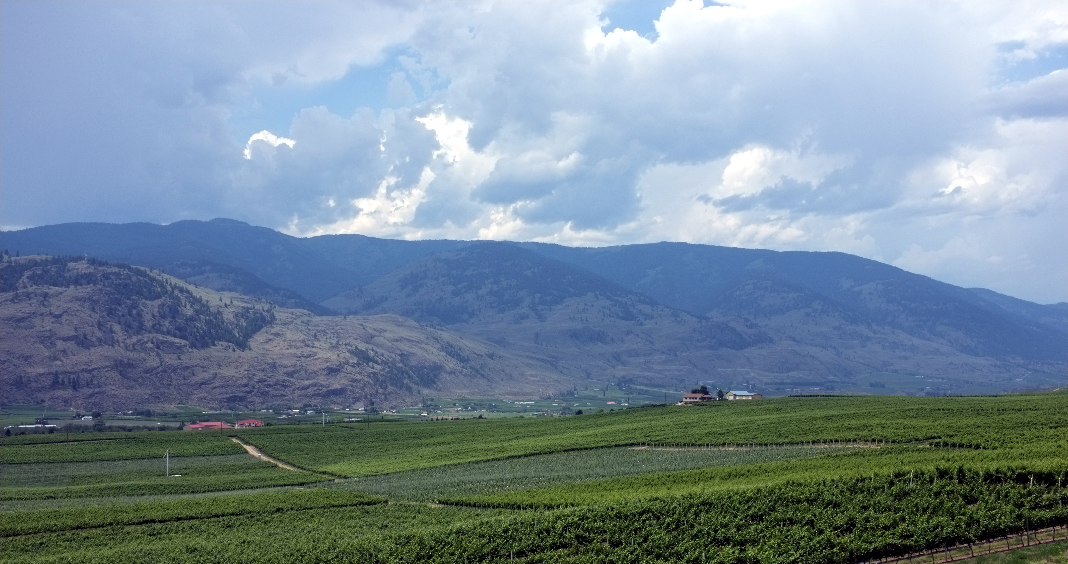 Okanagan Valley